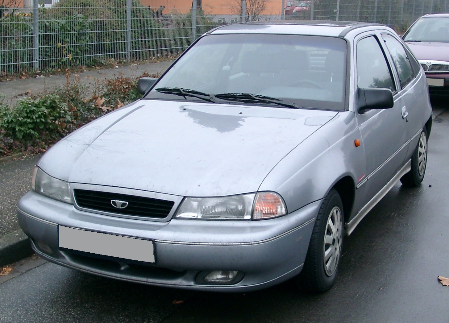 Daewoo Nexia